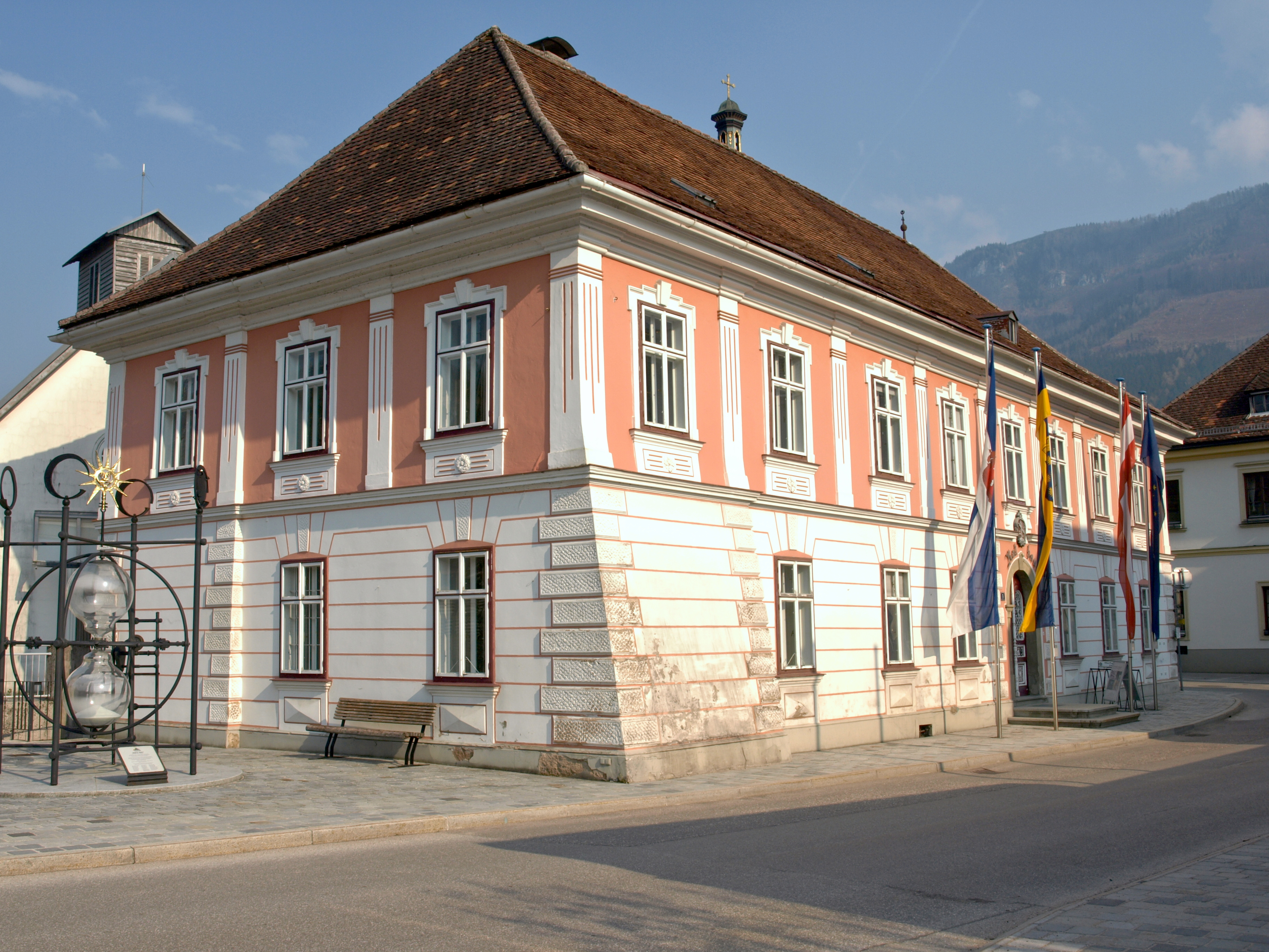 Rathaus